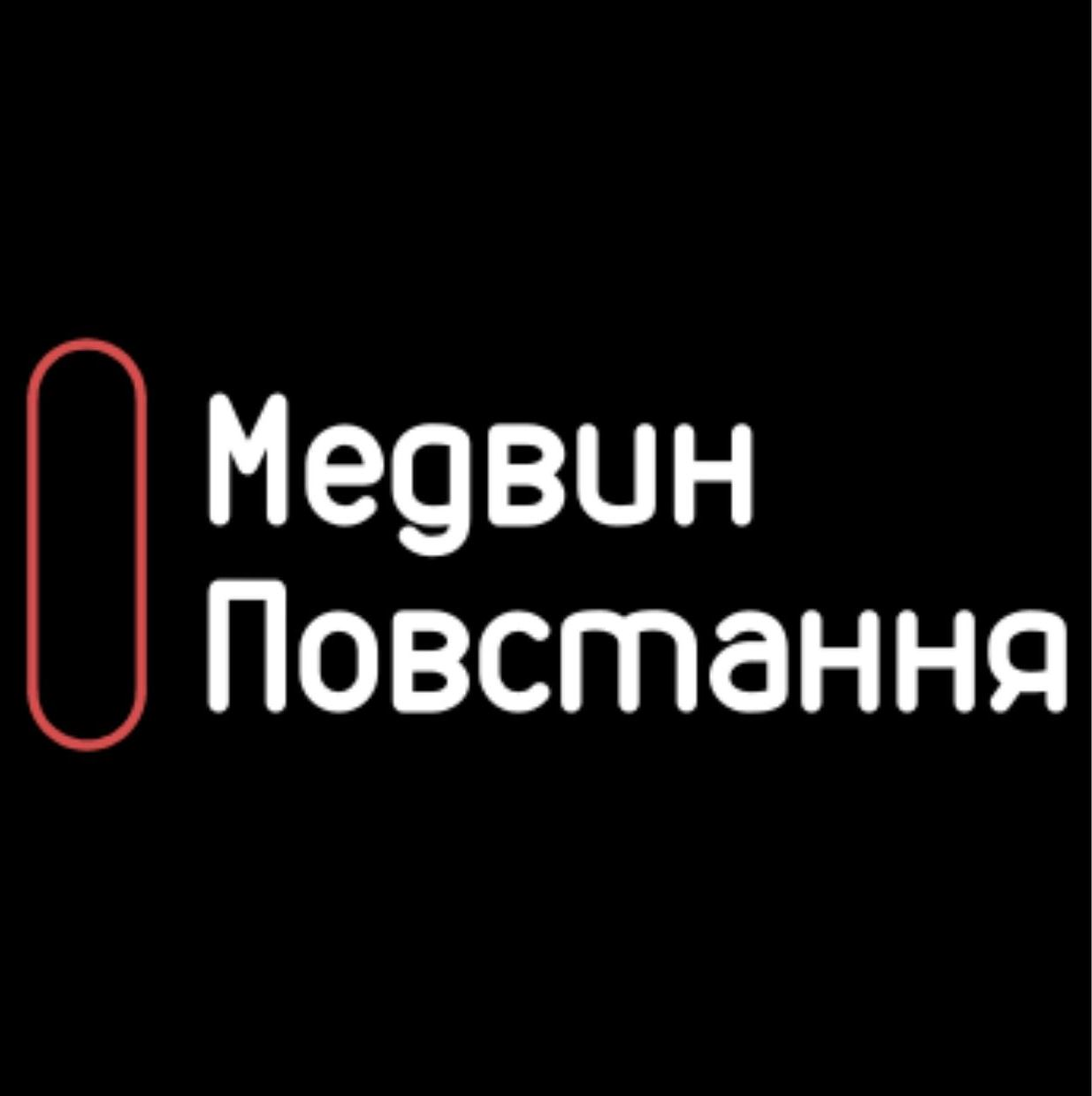 Логотип освітньої ініціативи "Медвин. Повстання"